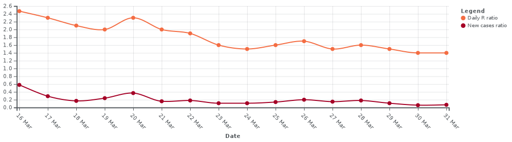 Daily R ratio Czech republic COVID-19